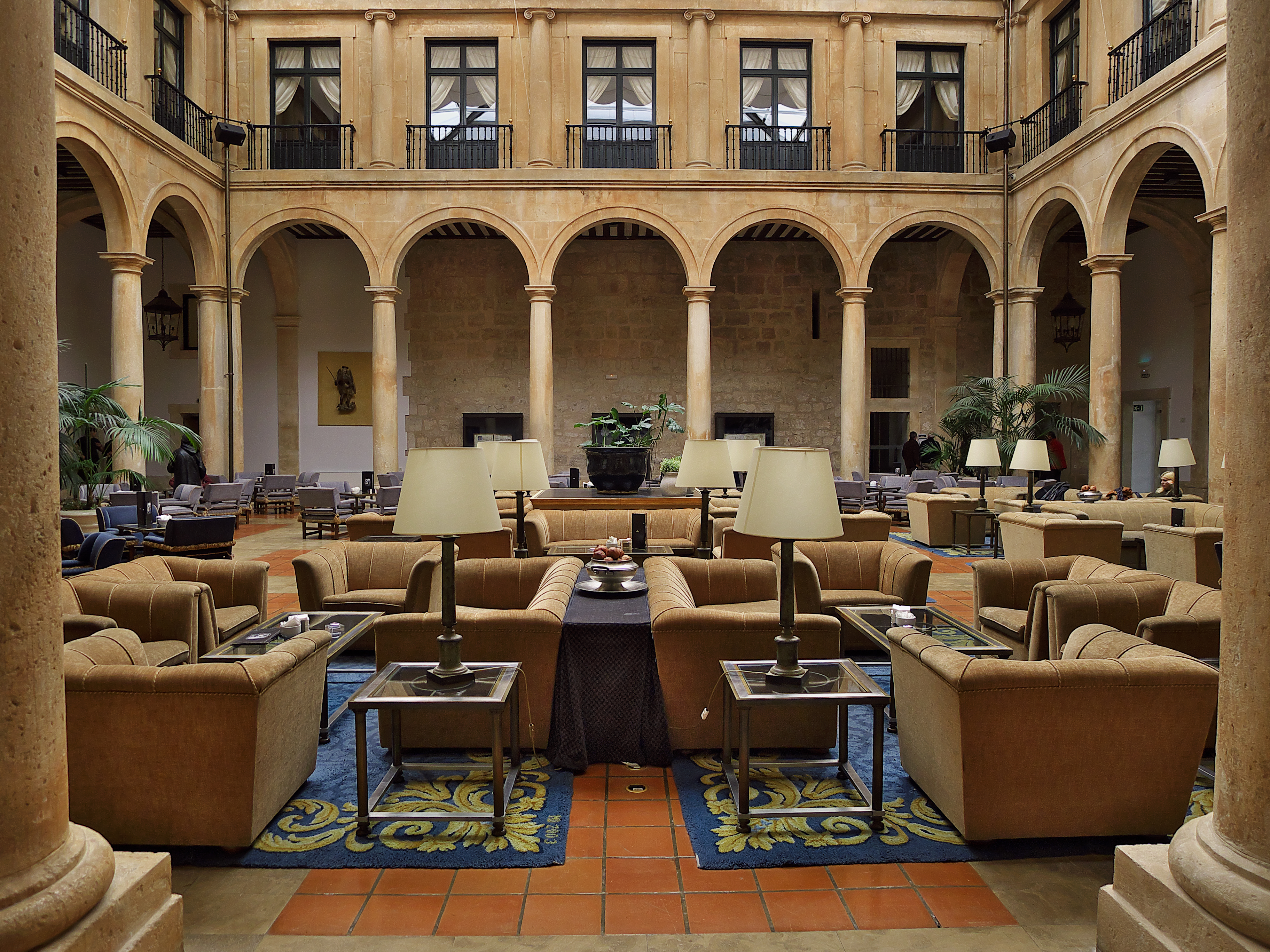 La arquitectura de Francisco de Mora (1601-1617)